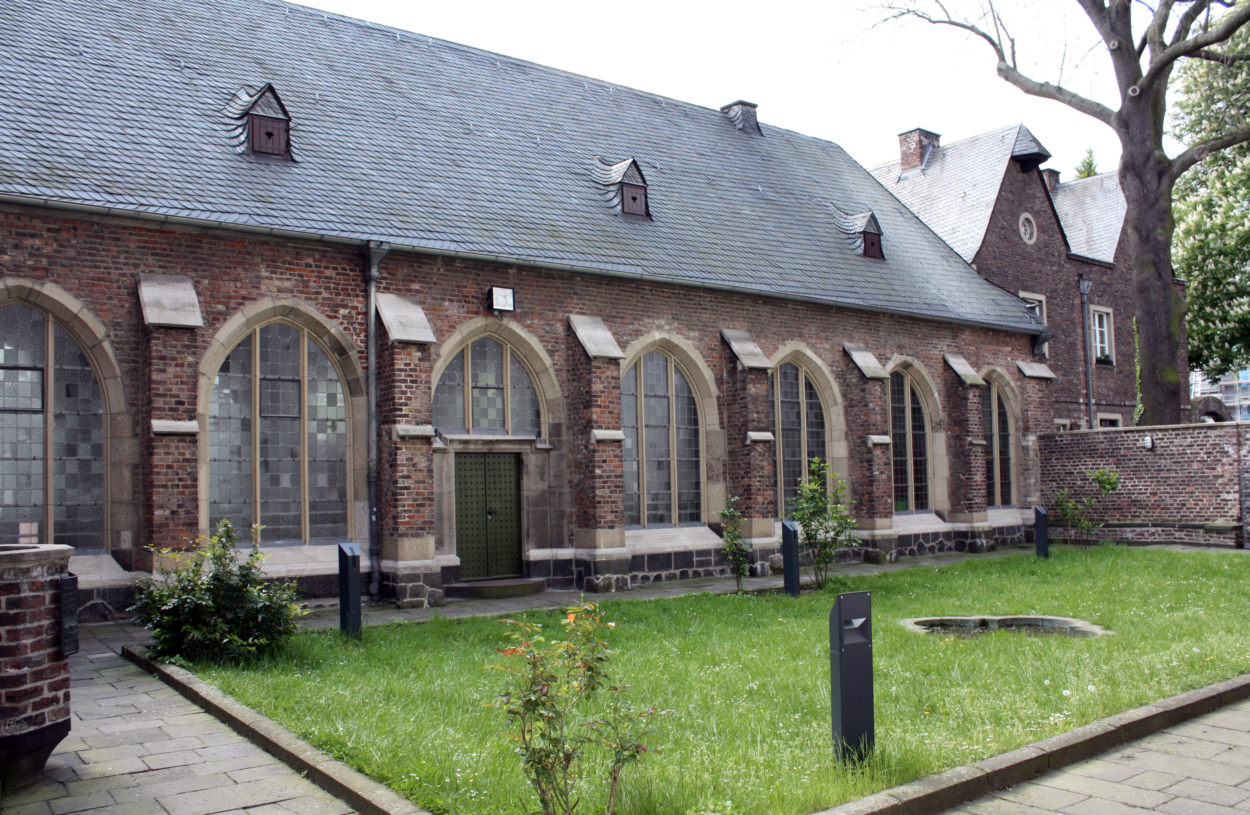 Kölner Kartause, Kreuzgang Ostseite